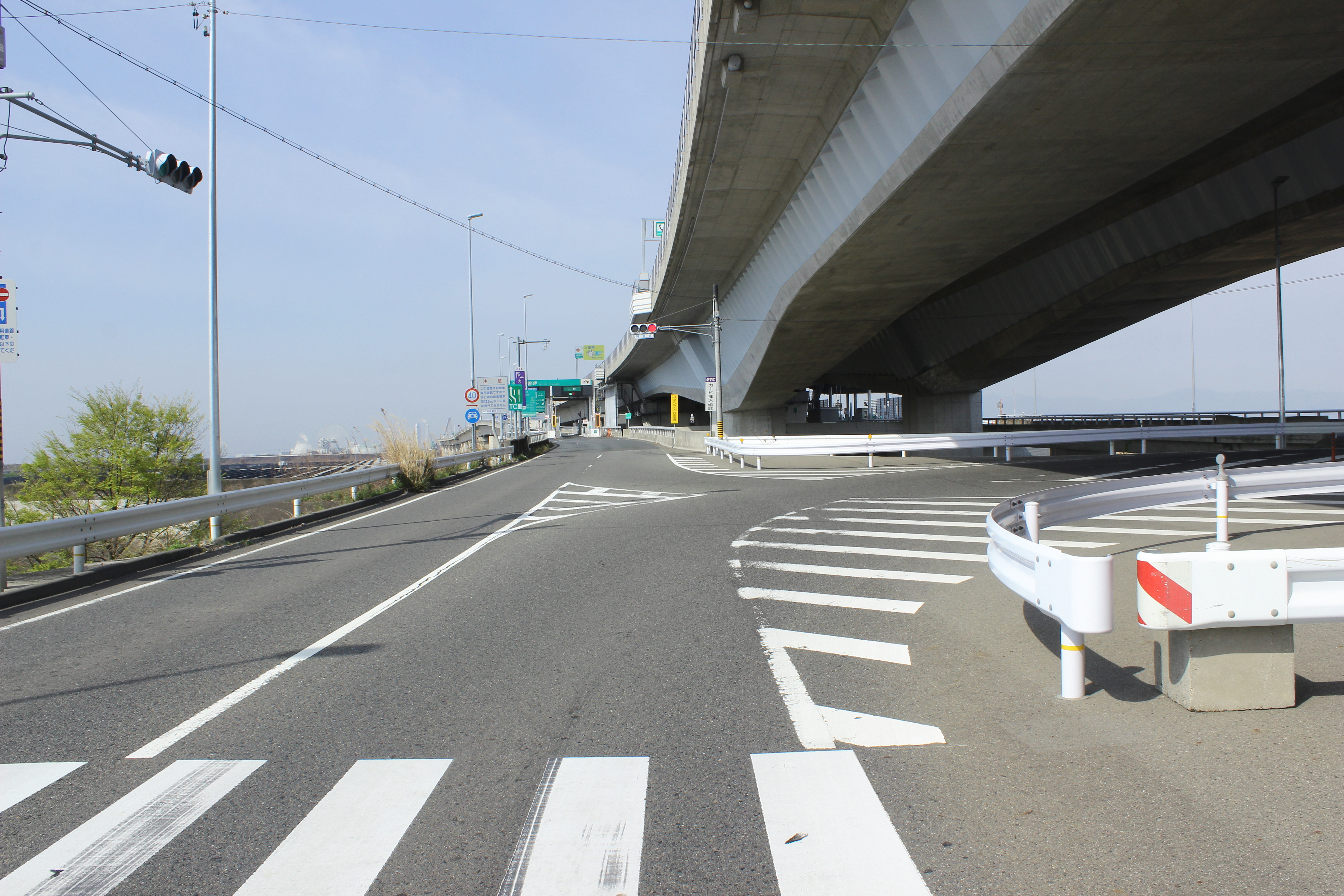 愛知県道103号境政成新田蟹江線と弥富木曽岬インターチェンジ